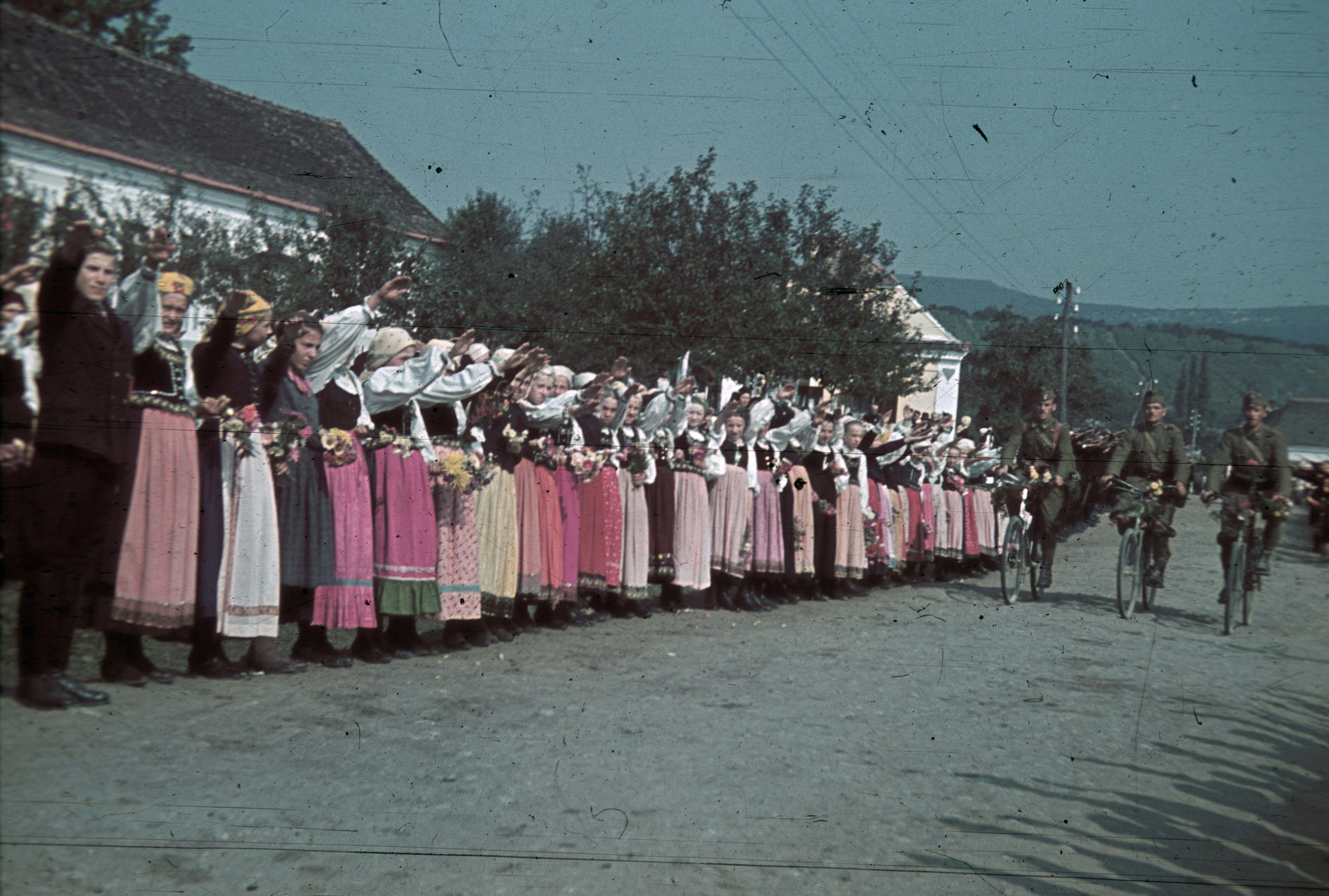 fő út. Location: Romania, Transylvania Tags: colorful, bicycle, soldier, Weiss Manfréd-brand Title: fő út.